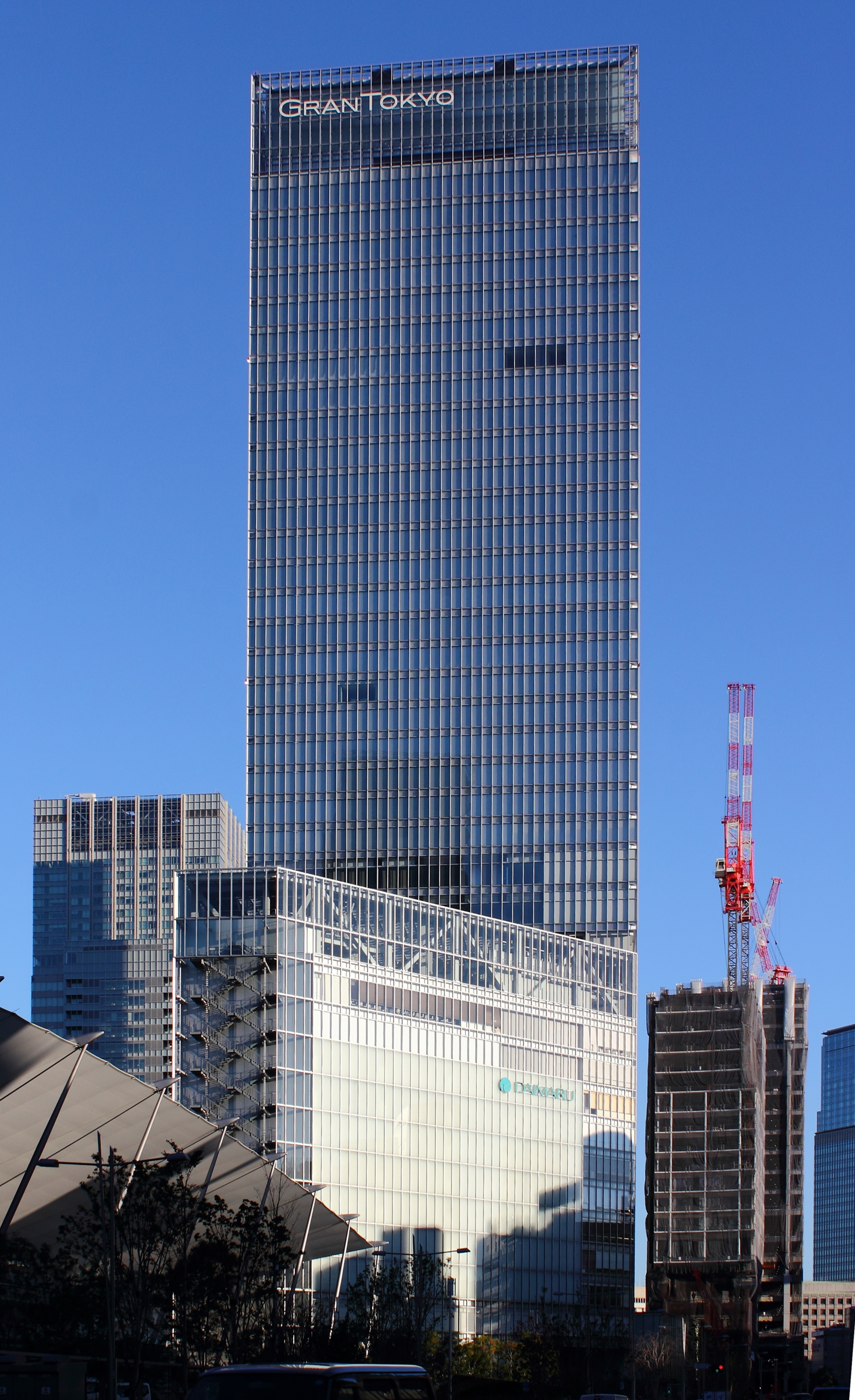 グラントーキョーノースタワー。大丸東京店。大和証券グループ本社